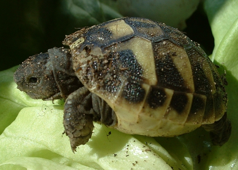 Eine kleine Thb ist gerade geschlüpft. Das Salatblatt ist aber nur eine gute Unterlage fürs Foto, keine gute Nahrung...